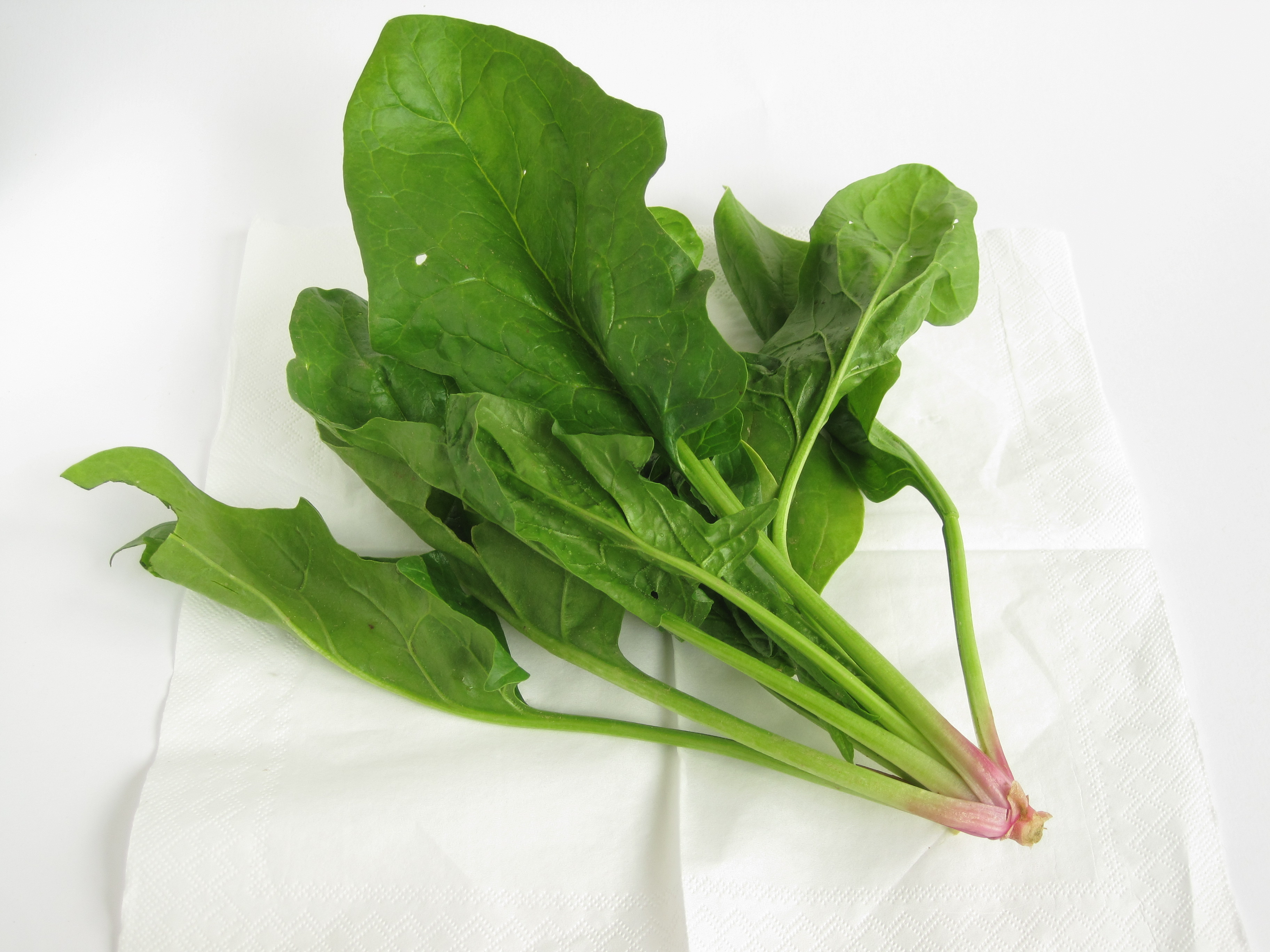 Spinat (Wurzelspinat)